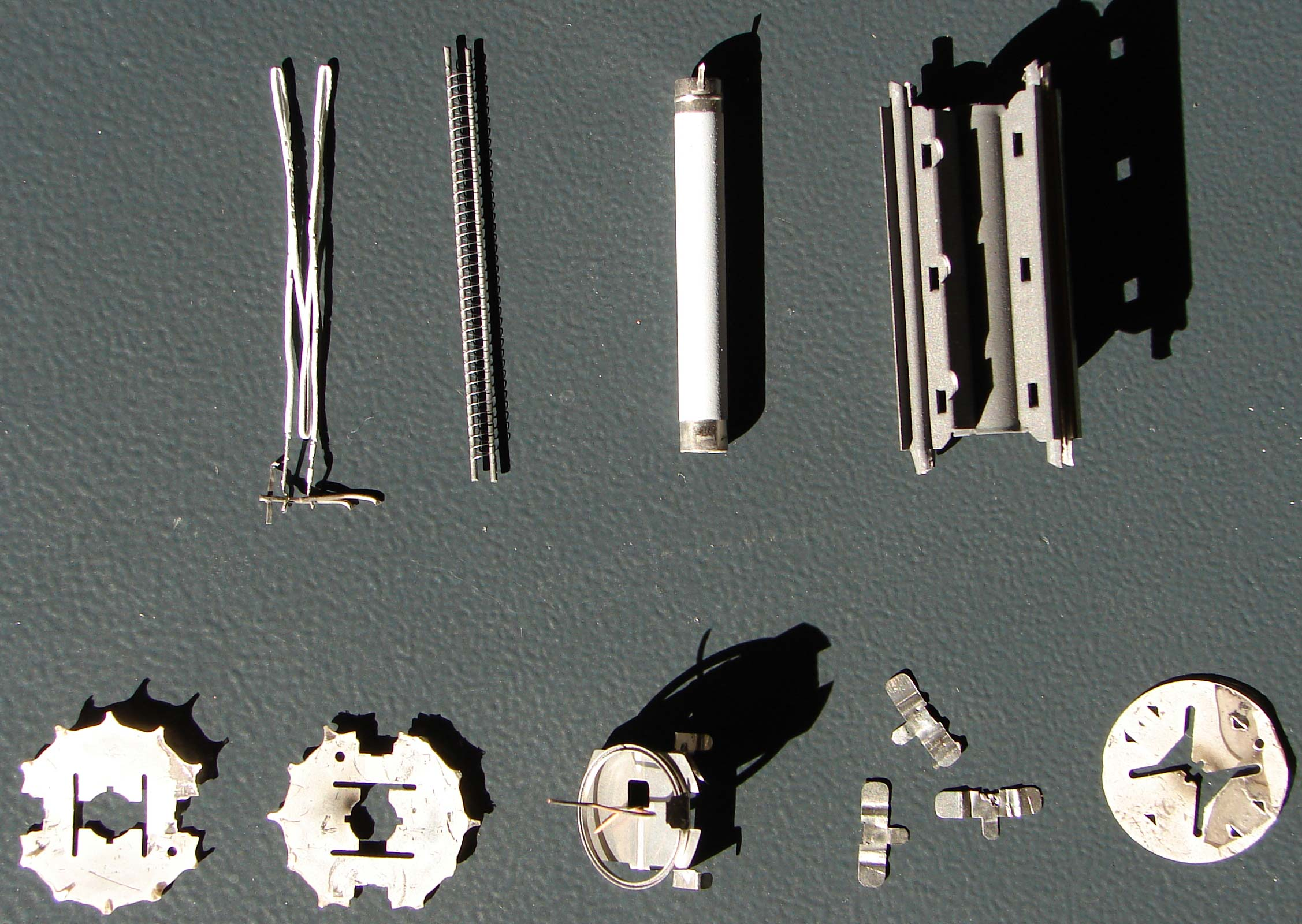 Eine Röhre PY88 zerlegt in Einzelteile.